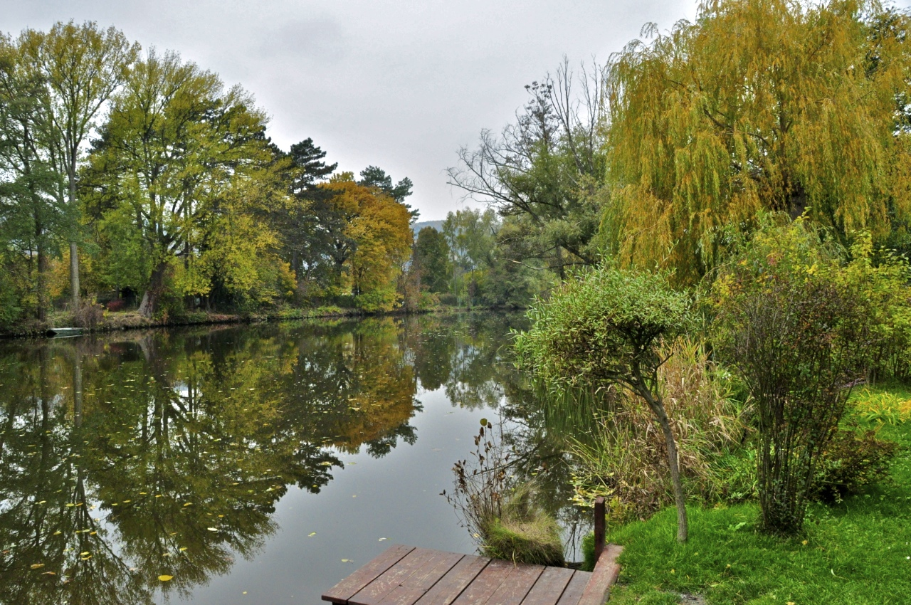 Svratka Brnu Jundrov, léto 2011